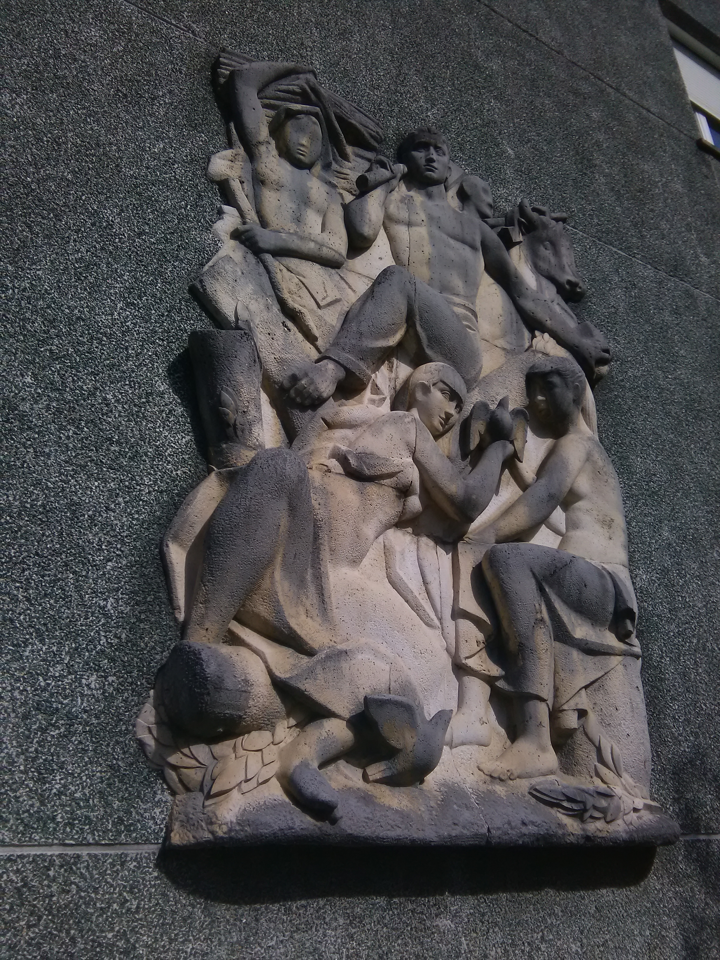 Antonio Martinez Penella eskultore valentziarrak eliza eta eraikin publiko asko apaindu zituen frankismo garaian.